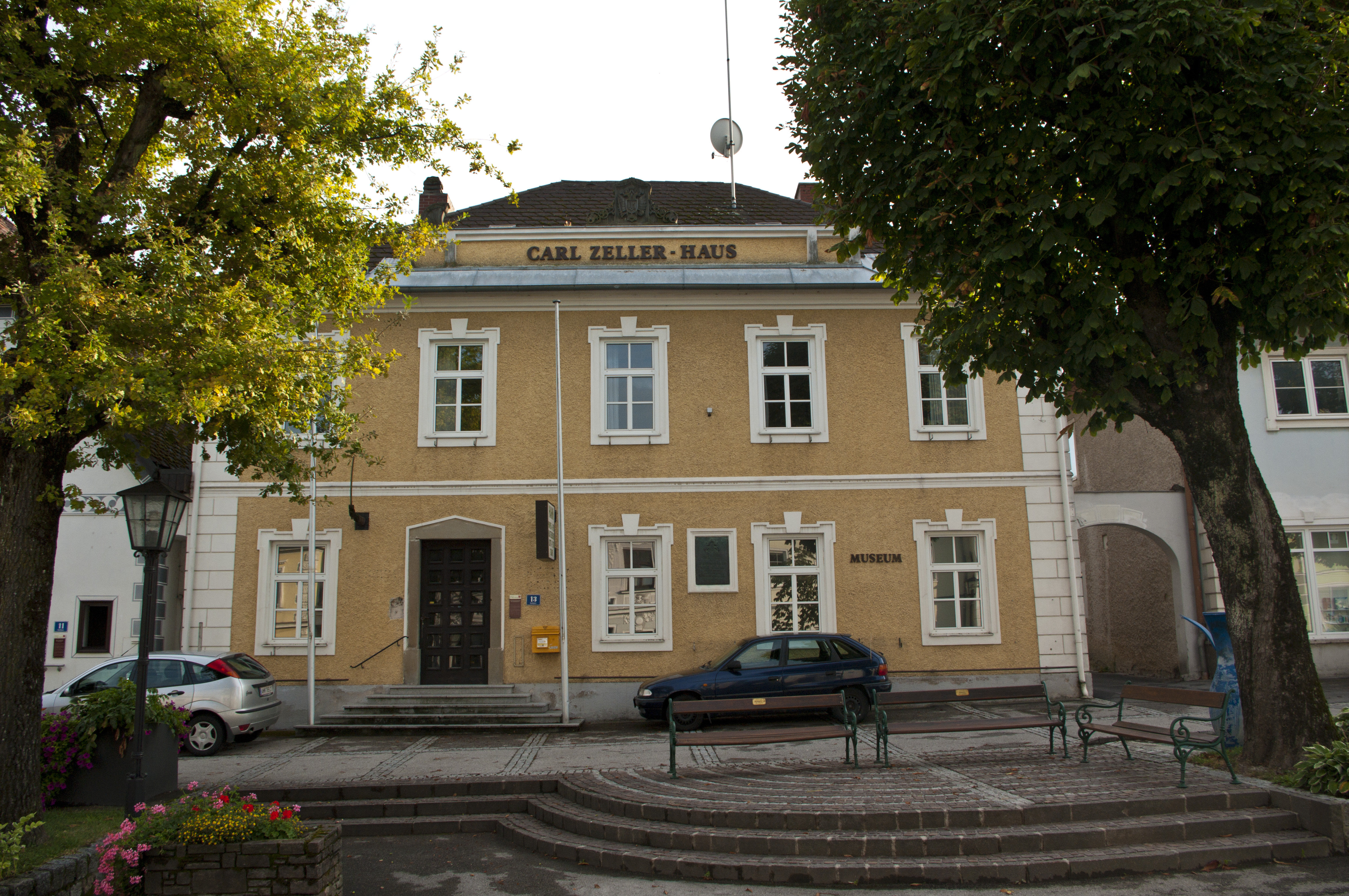 Carl-Zeller-Haus, ehem. Bezirksgericht